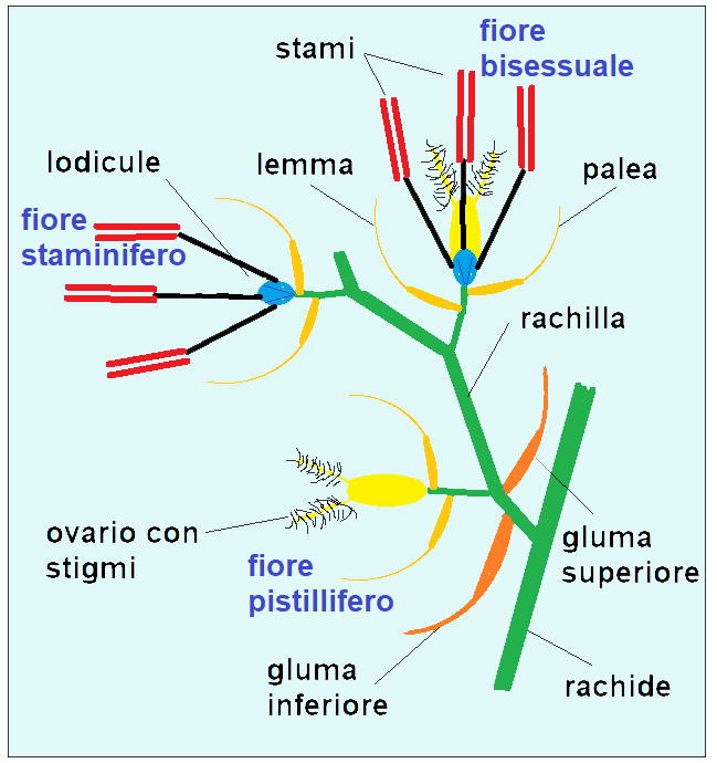 Spighetta con fiori completi e incompleti (Poaceae)